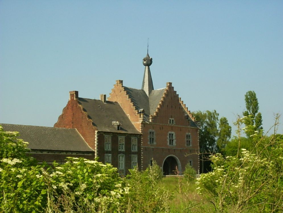 Poortgebouw - eigen foto Categorie:Afbeelding poort